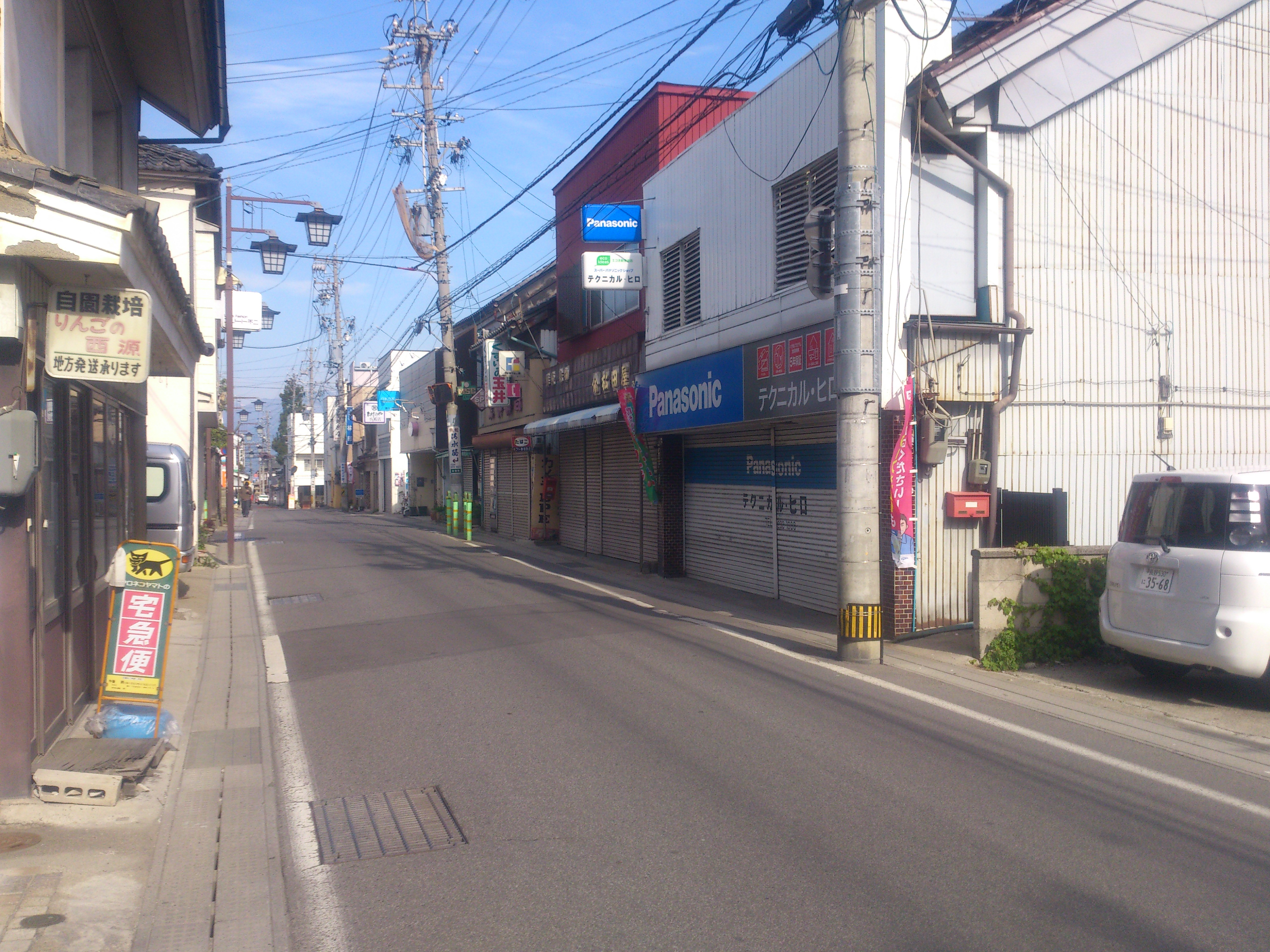 桜枝町商店街（長野県長野市桜枝町）